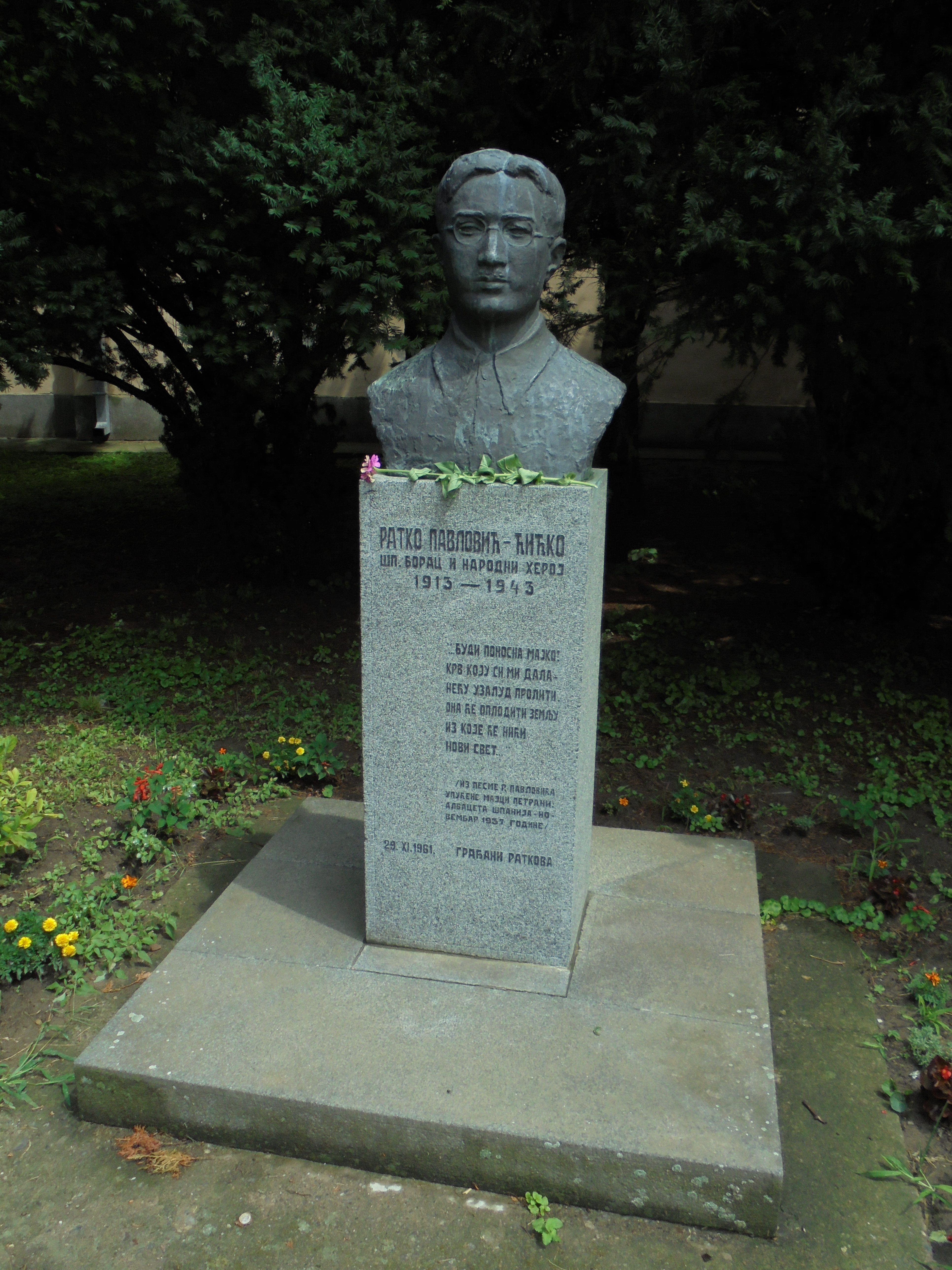 Srpskohrvatski / српскохрватски: Bista španskog borca i narodnog heroja Ratka Pavlovića Ćićka (1913-1943) u selu Ratkovu u Bačkoj, koje od 1948. godine nosi njegovo ime. Na postamentu je citiran deo pesme koje je iz Albacete napisao majci: „Budi ponosna, majko, jer krv koju sam prolio, nije prolivena uzalud. Ona će natopiti zemlju iz koje će nići novi svet“.